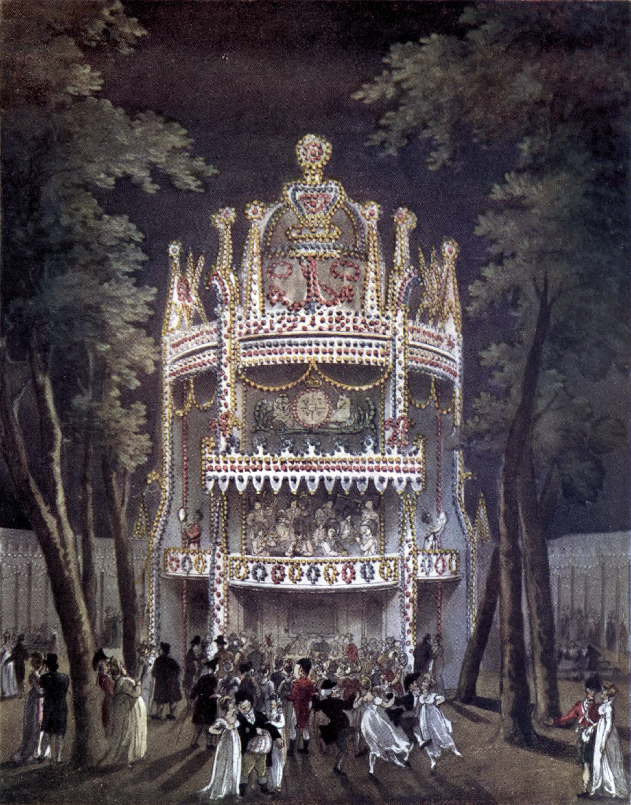 Vauxhall Garden